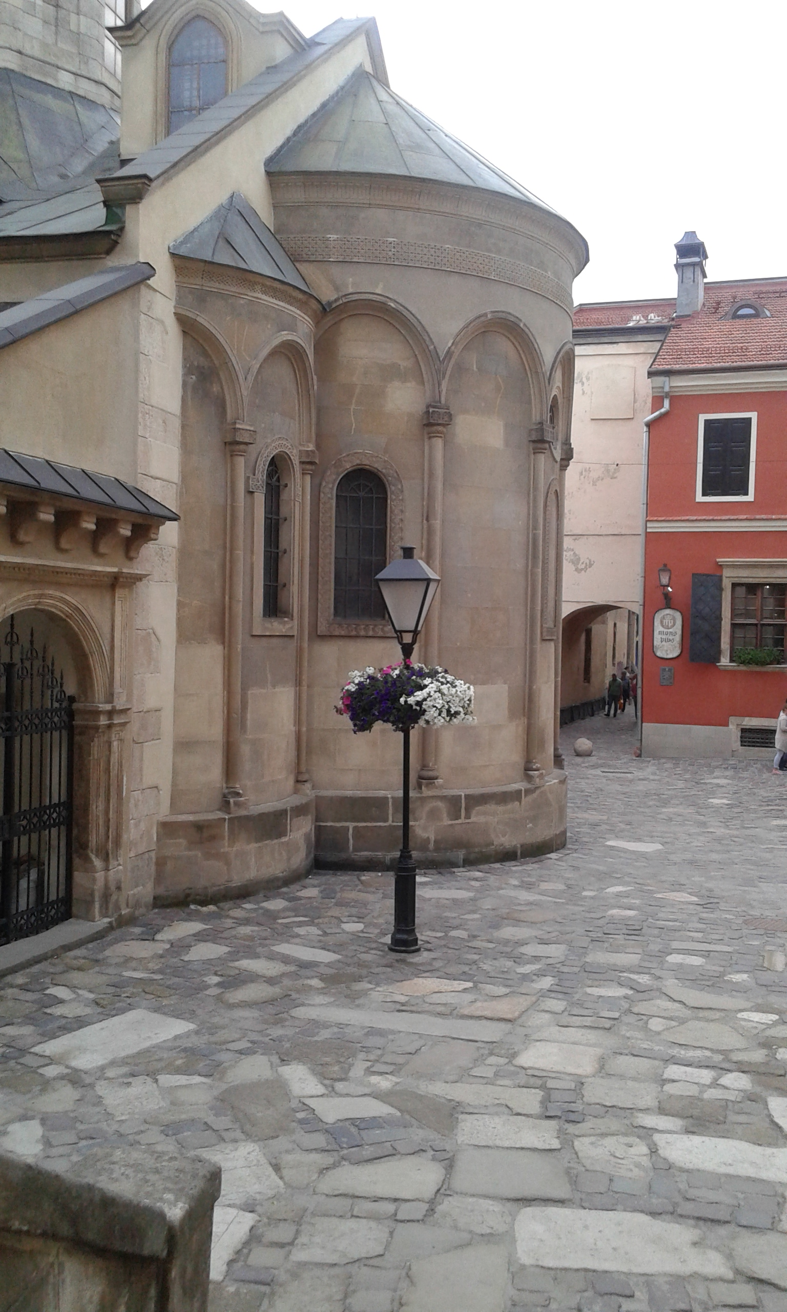 Вірменський собор св. Трійці, Львів, Вірменська вул., 7